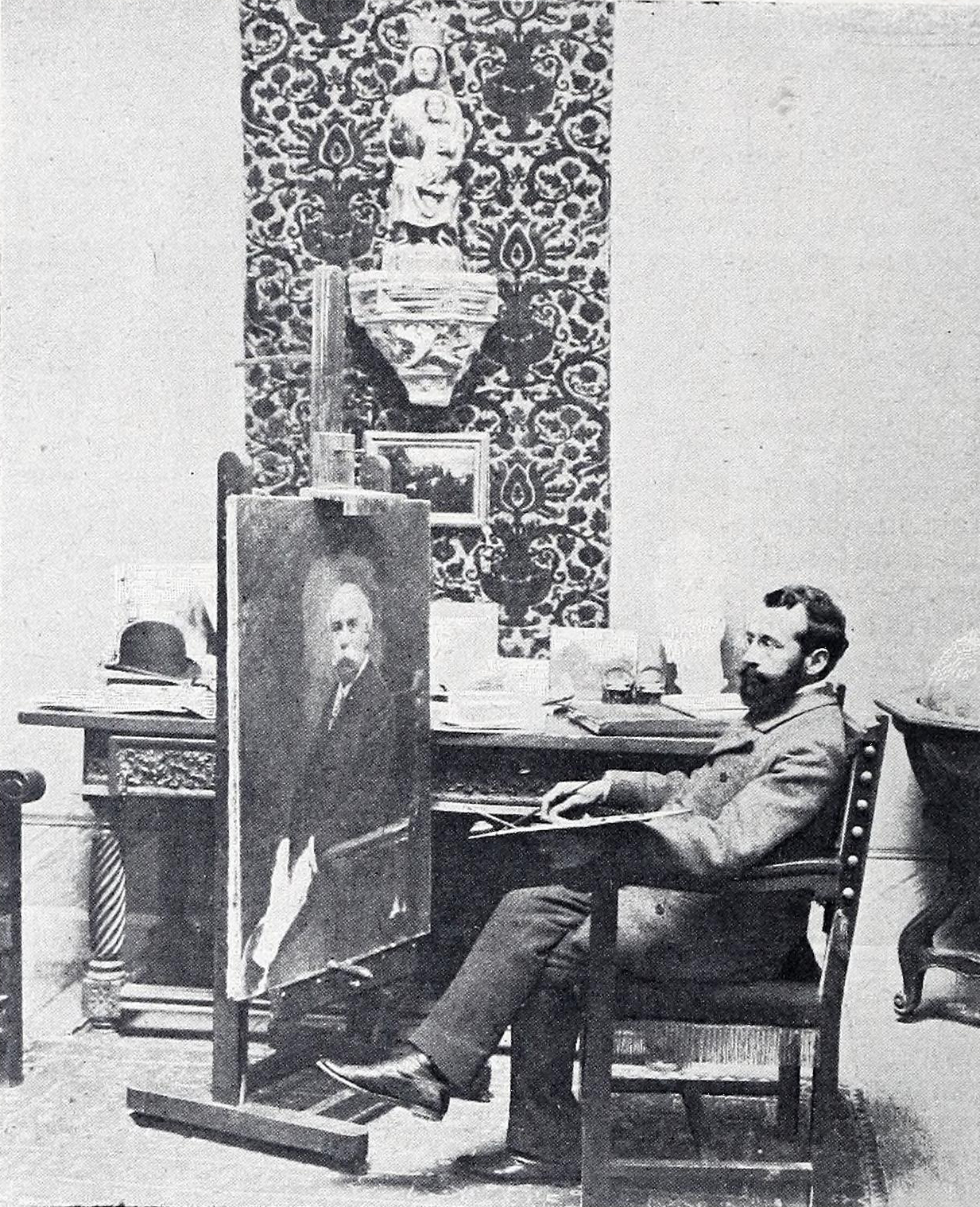 Luis Menéndez Pidal, nuevo académico.